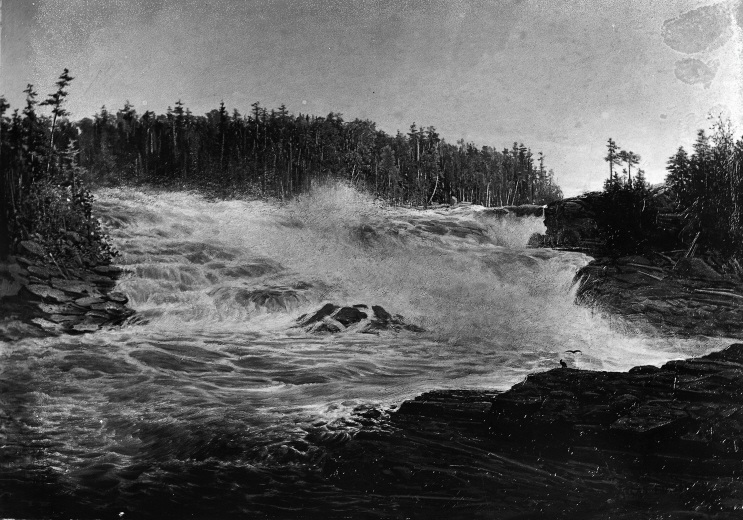 Reproduction photographique réalisée en 1919-1920 par Wm. Notman & Son de la peinture d'Allan Aaron Edson. Plaque sèche à la gélatine. 20 x 25 cm